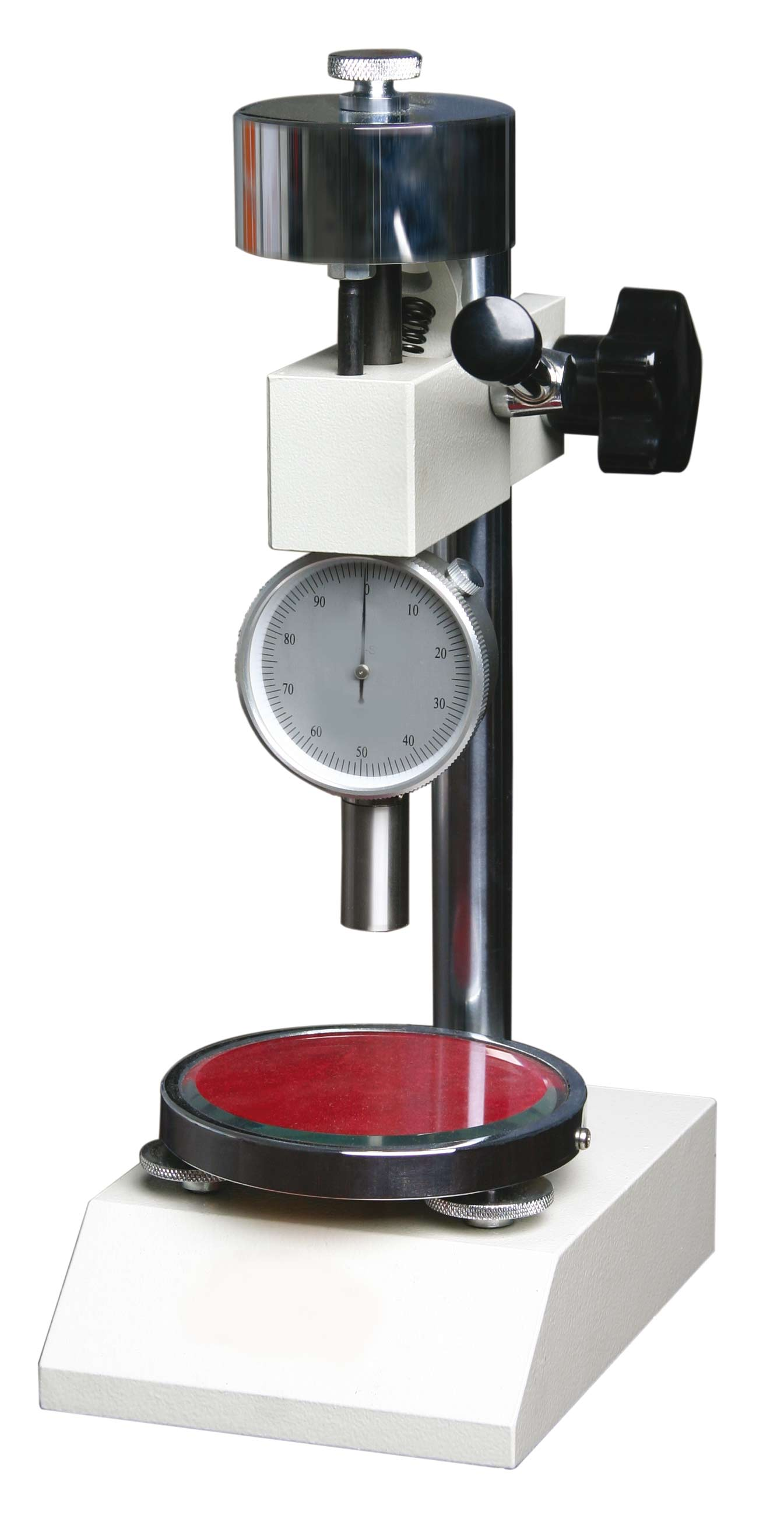 Аналоговый дюрометр Шора на штативе